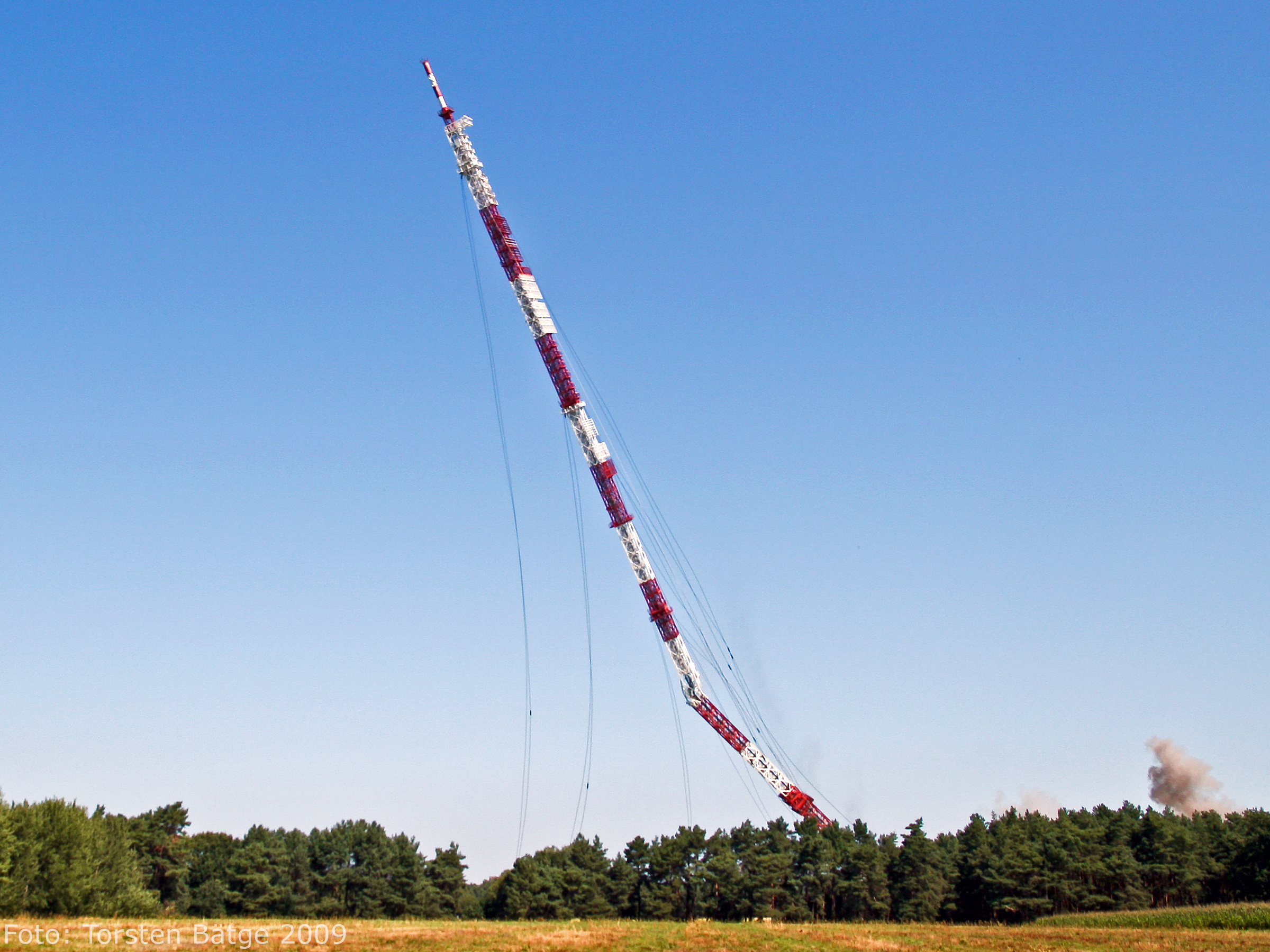 Der 324 m hohe Stahlfachwerkmast Gartow 1 des Senders Höhbeck (Funkübertragungsstelle Gartow 1/2) wird gesprengt. Als Sprengmittel kommen 3 kg Semtex Razor 40, verteilt auf 16 Schneidladungen an 8 Pardunenlaschen zum Einsatz. Die Pardunen, mit denen der Turm in nordöstlicher Richtung abgespannt war, wurden am Fundament getrennt. Der Turm, der noch nach Nordwesten und Süden abgespannt ist, fällt dadurch in südwestliche Richtung über die Straße zwischen Brünckendorf und der Schwedenschanze. Geplant war eine Fallrichtung von 244 °.